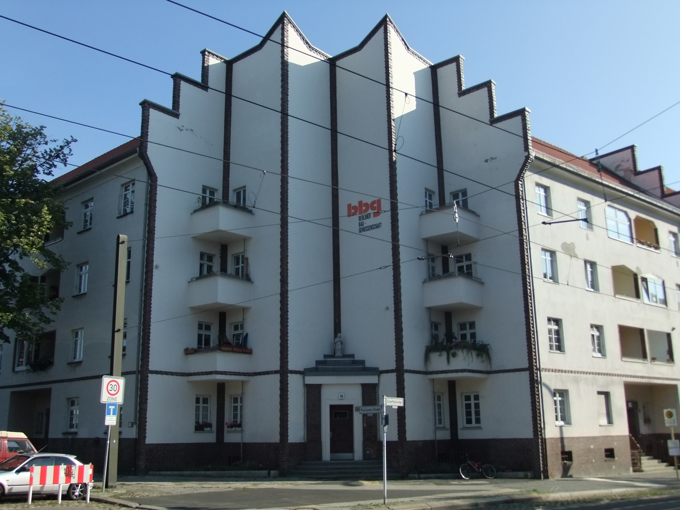 Denkmalliste Berlin 09040261- Berlin Lichtenberg Paul-Junius-Straße 2/12, Wohnanlage, 1924-27 von Hans Kraffert Scheffelstraße 15-16 (Baudenkmal)